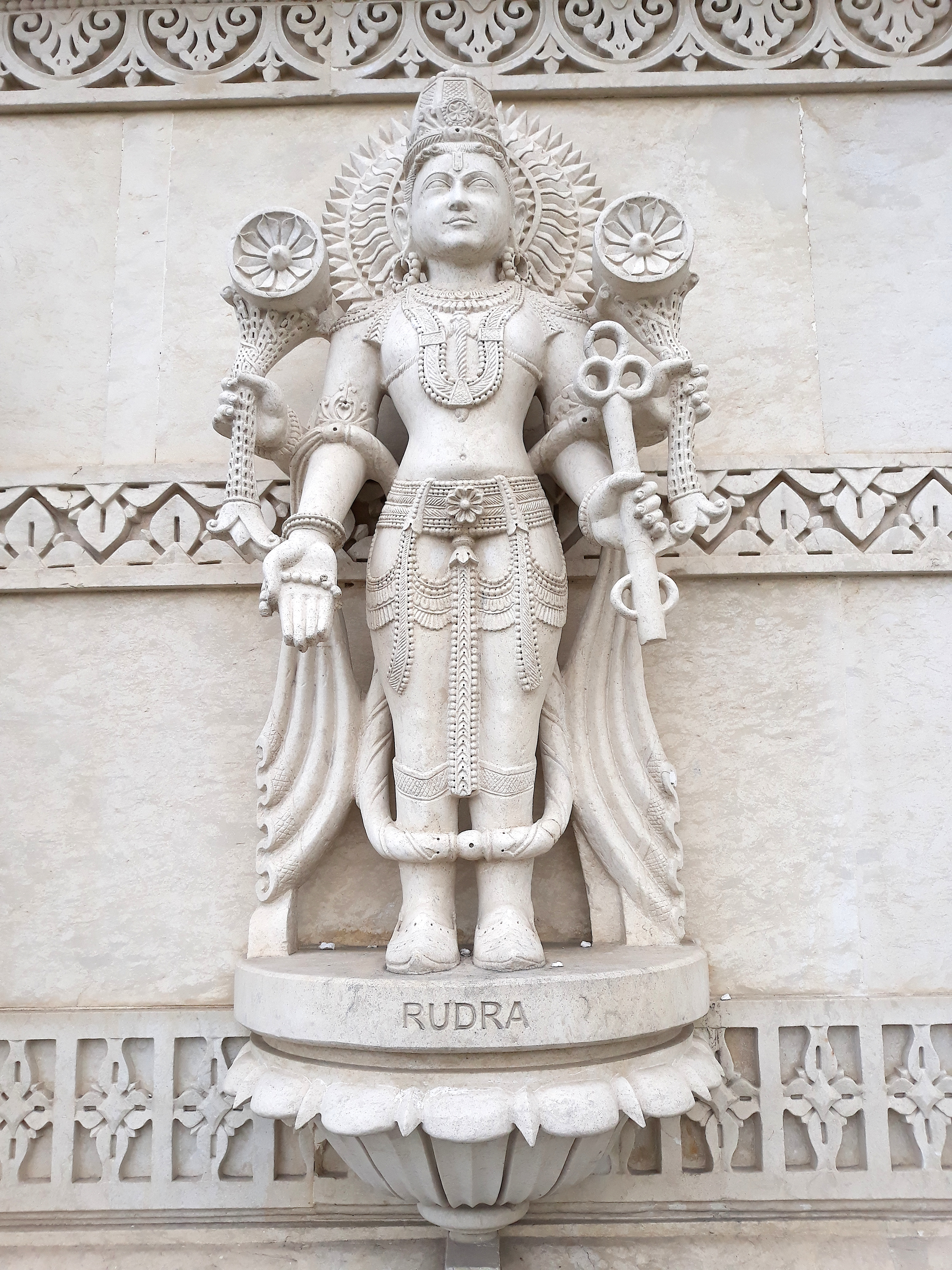 Dettaglio del Shri Swaminarayan Mandir di Londra